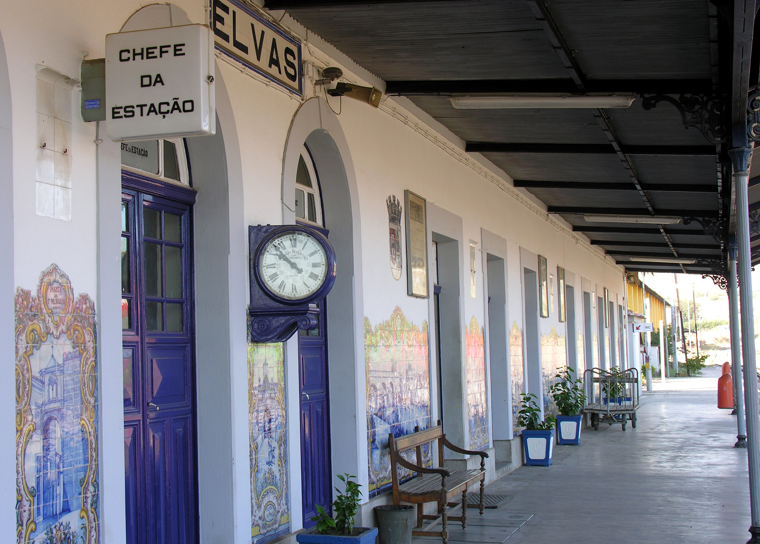 Elvas Station, Alentejo, Portugal.